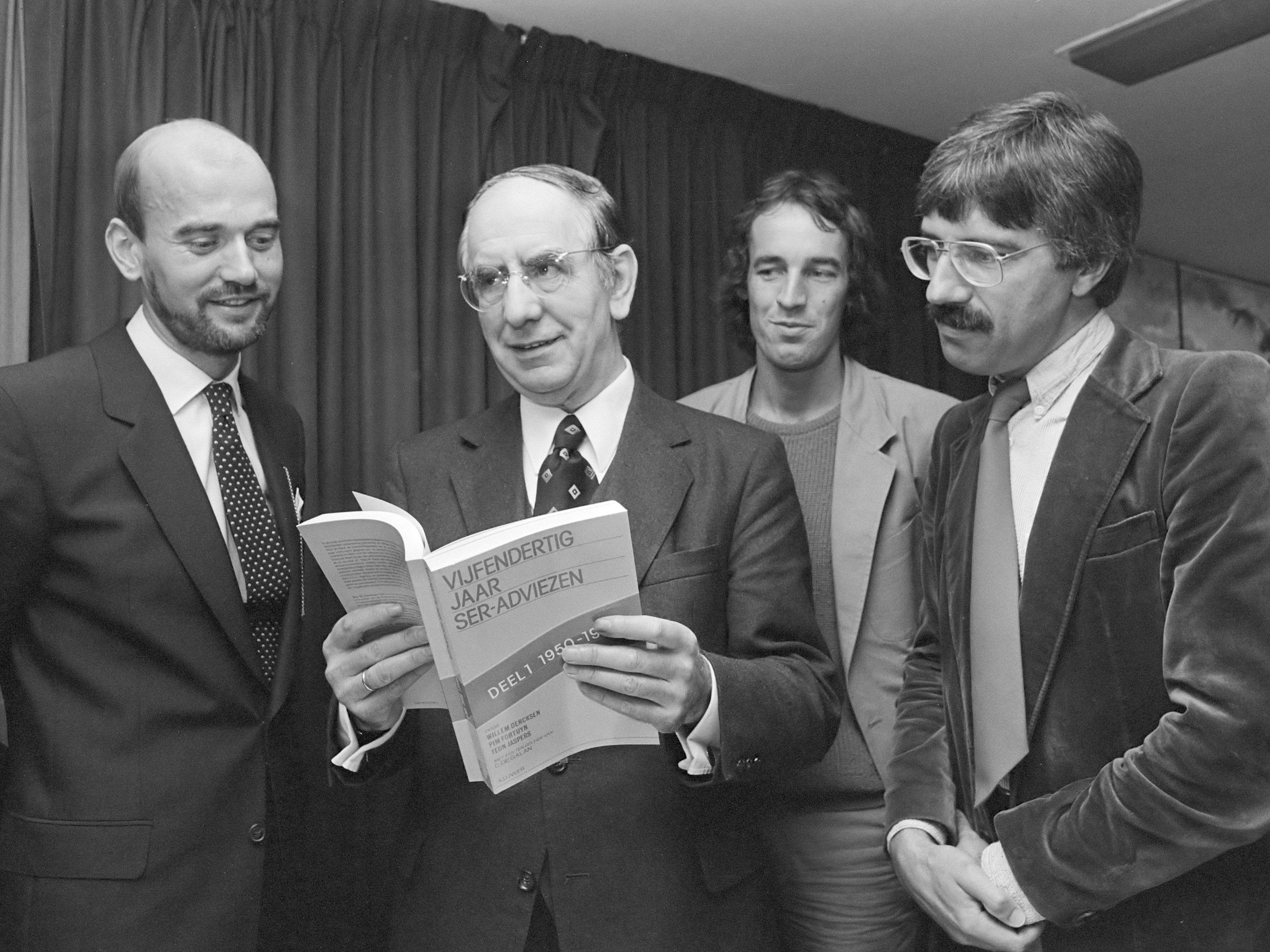 Presentatie van het boek "Vijfendertig jaar SER-adviezen"; v.l.n. auteur dr. W.S.P. Fortuyn, voorzitter van de SER dr. J.W. de Pous, auteur drs. W. Dercksen en auteur mr. A.Ph.C.M. Jaspers